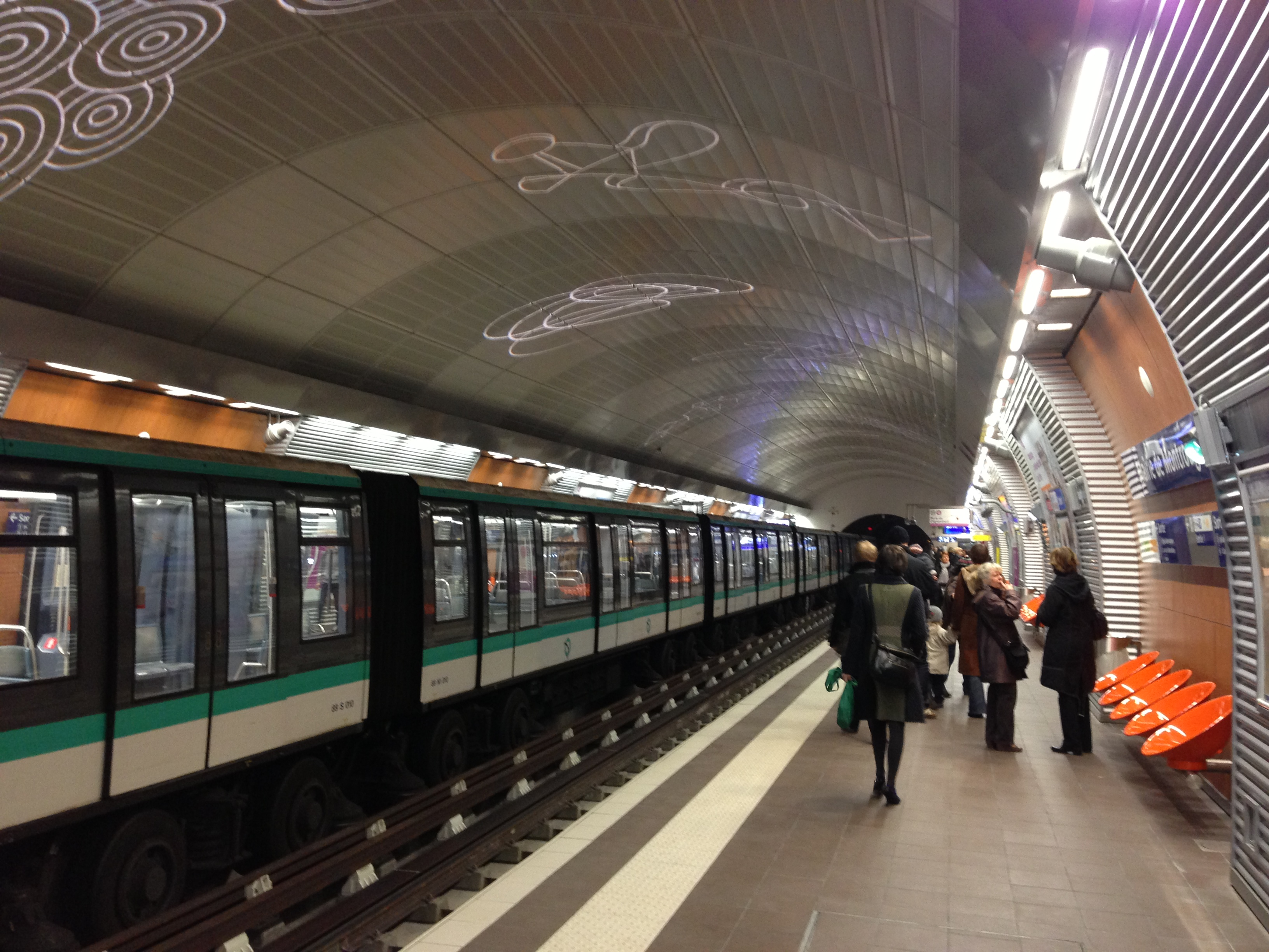 Le quai direction Porte d'Orléans à la station de métro Mairie de Montrouge